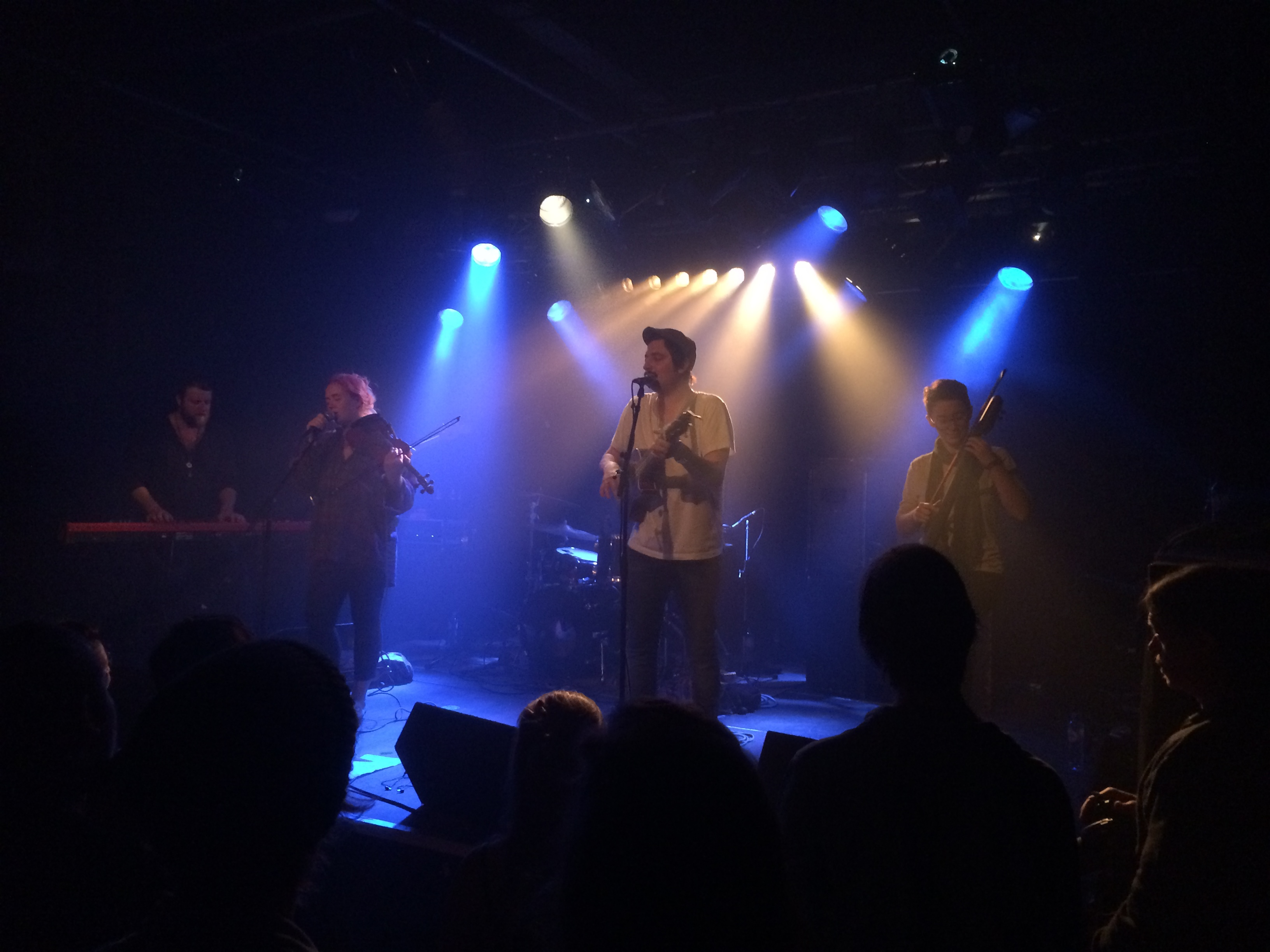 Texaanse Indieband Wild Child in Nijmegen